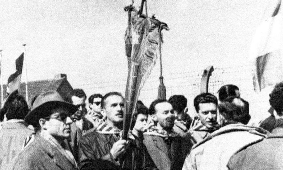 Nella foto, Levi - qualche anno dopo - in visita al memoriale del campo di Buchenwald.